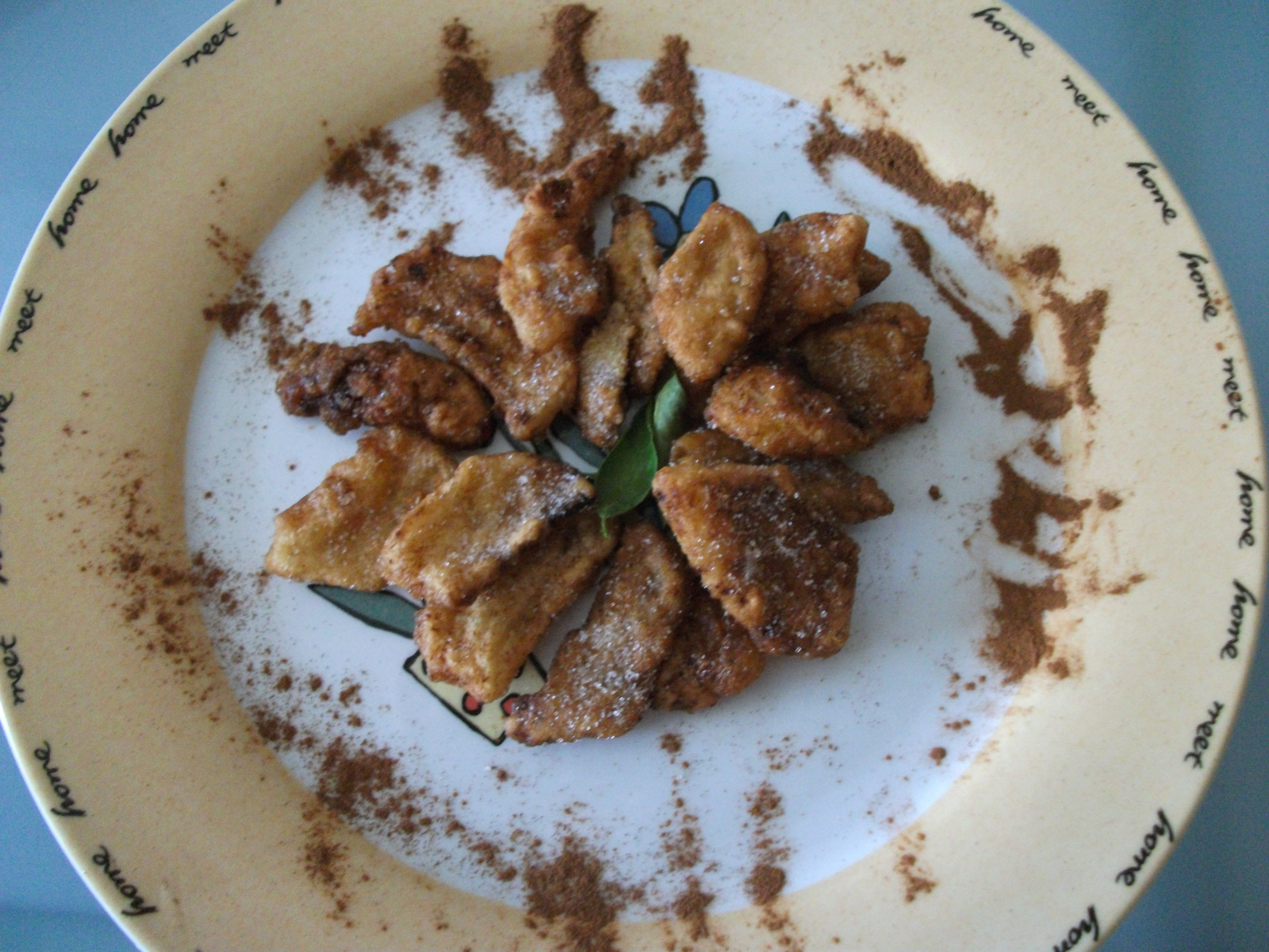 Maçãs fritas, sobremesa típica de Ferrol (Galiza).